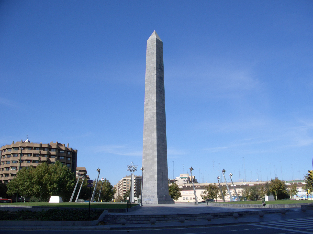 Aragonés: Plaza d'Europa, dentrada á lo bico de l'Almozara (Zaragoza, Aragón))